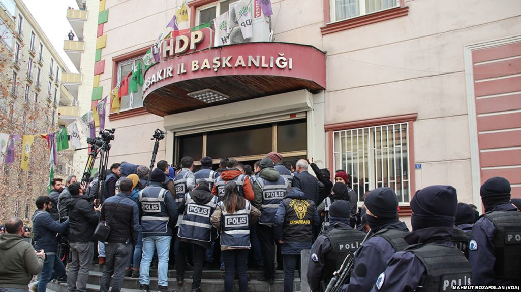 HDP'nin Afrin Operasyonı sonrası düzenlemek istediği gösteriye karşı engel.